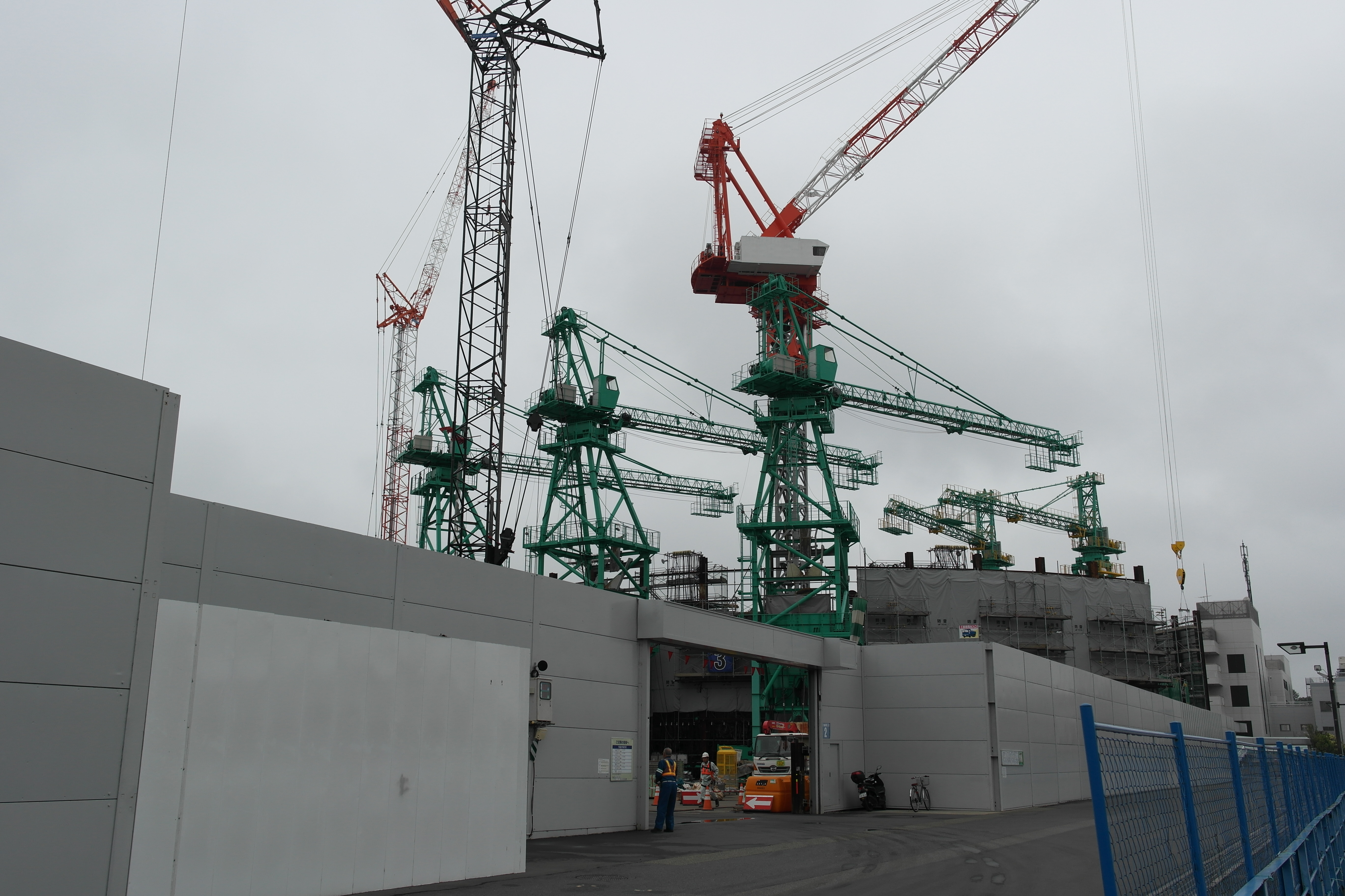 JR貨物の梶ヶ谷貨物ターミナル駅敷地内で建設が進むリニア中央新幹線梶が谷非常口工事現場。